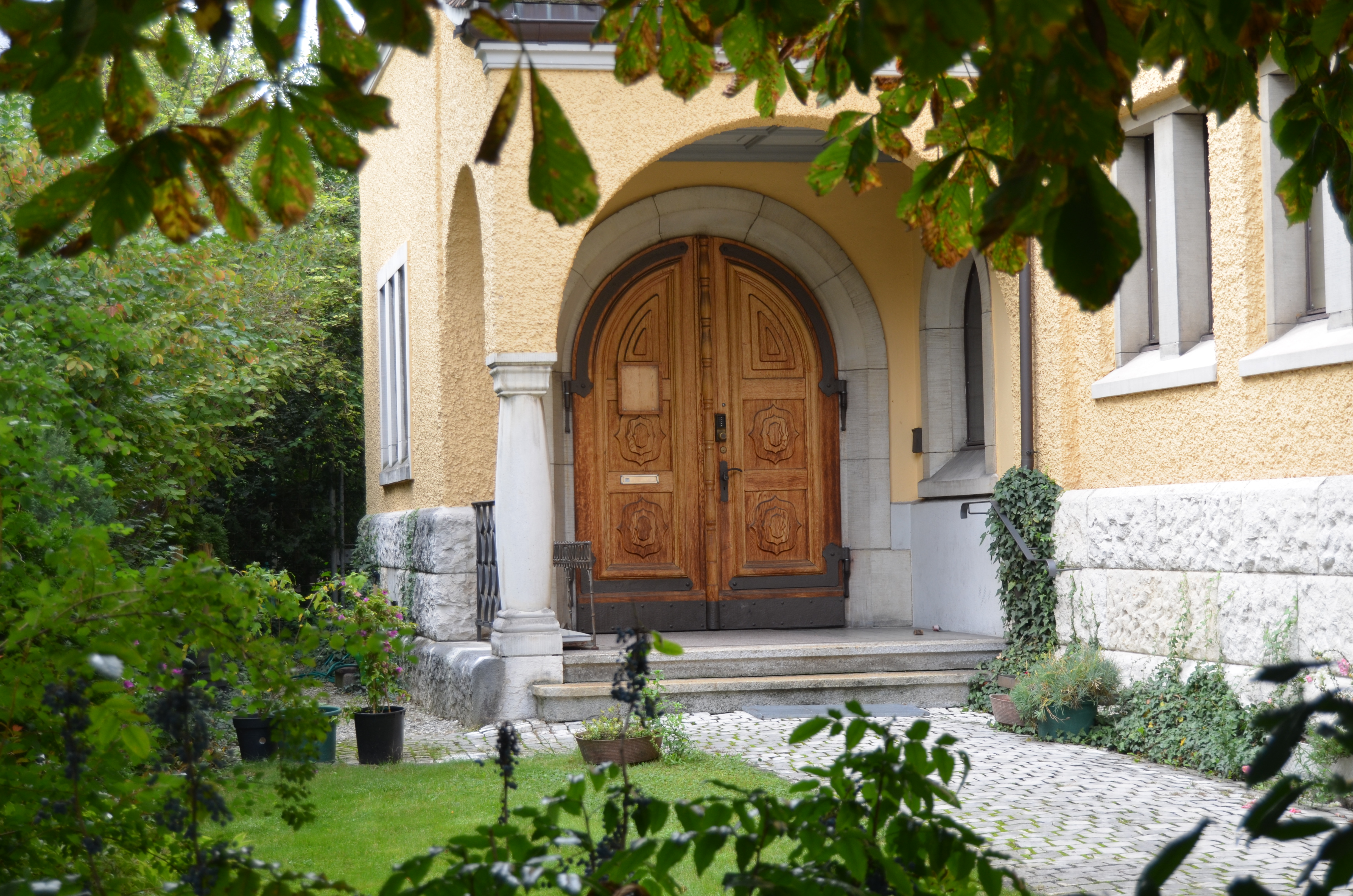 Synagoge. KGS_Nr = 11609. 17 Parkstrasse, Baden (AG). 665.594 / 259.024. Kategorie: A. Objektart: Sakralbauten. Bauten anderer Glaubensrichtungen. Synagoge